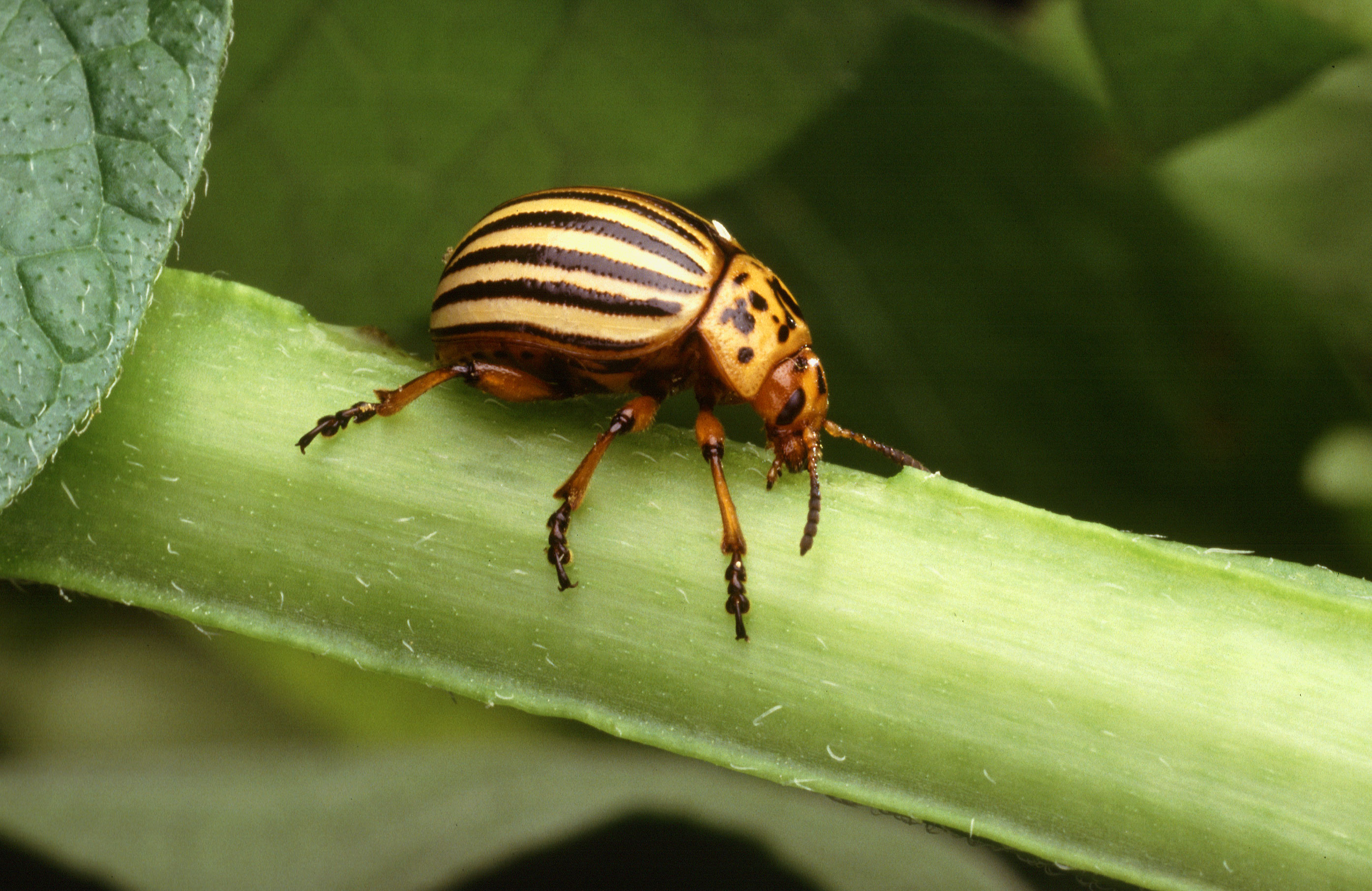 A Colorado potato beetle.